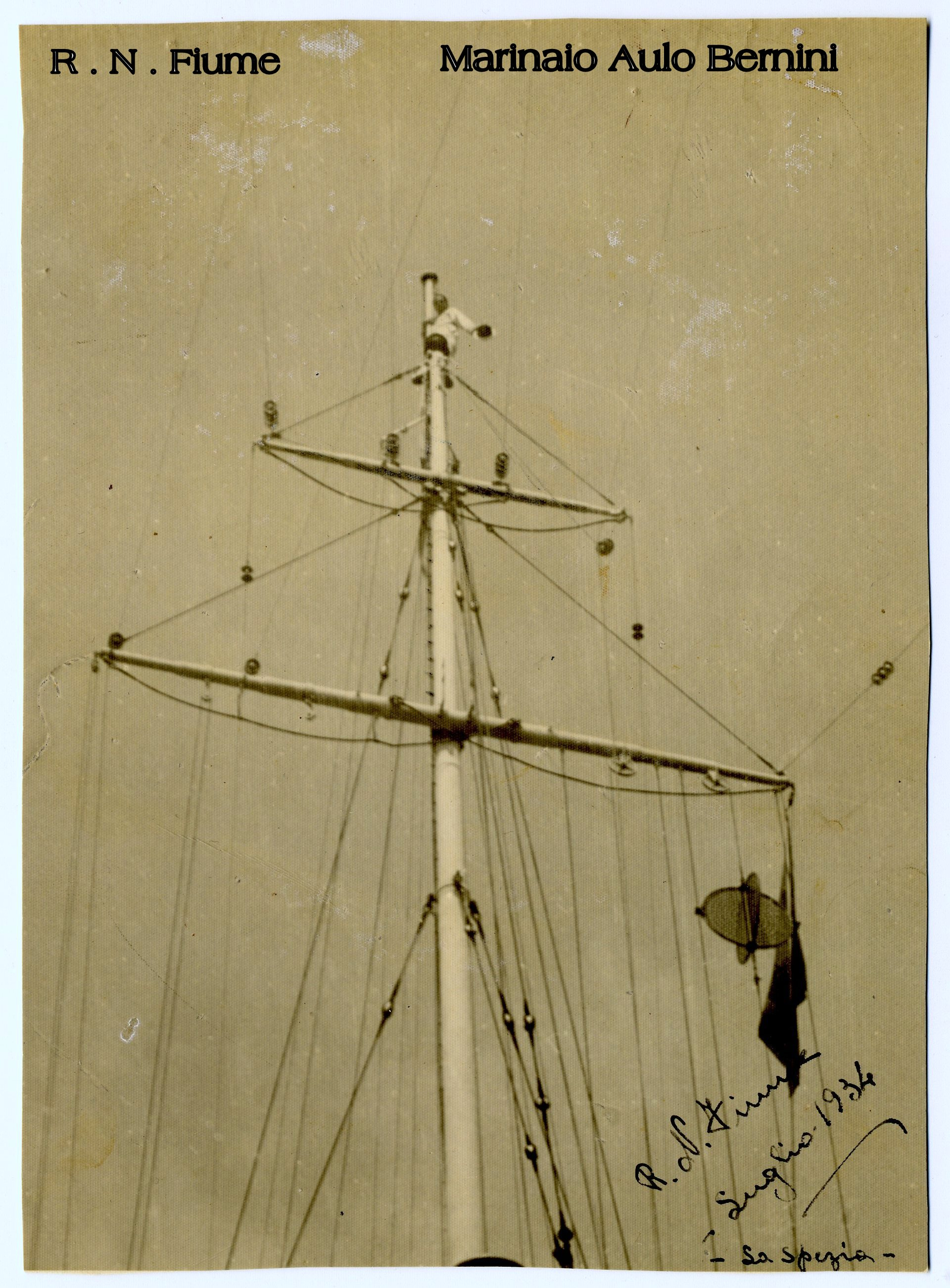 Regia Nave Fiume: albero